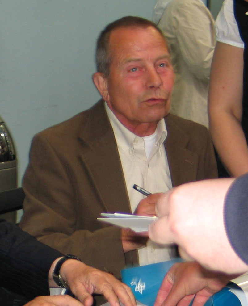 DDR-Kosmonautenkandidat Eberhard Köllner